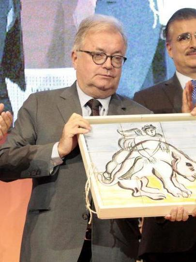 En la clausura de la Feria Internacional del Libro de Guadalajara, Luis Cueto, Coordinador General de Alcaldía, ha protagonizado el cambio de estafeta, como se denomina la entrega del testigo al siguiente invitado de honor: Portugal.